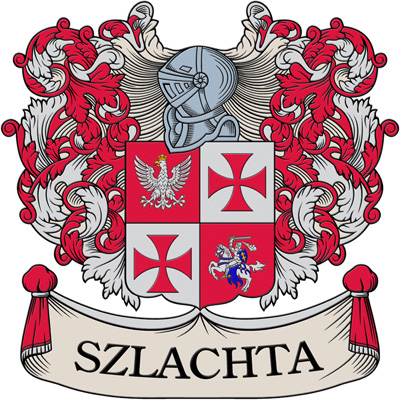 Герб дворянского клуба "SZLACHTA"